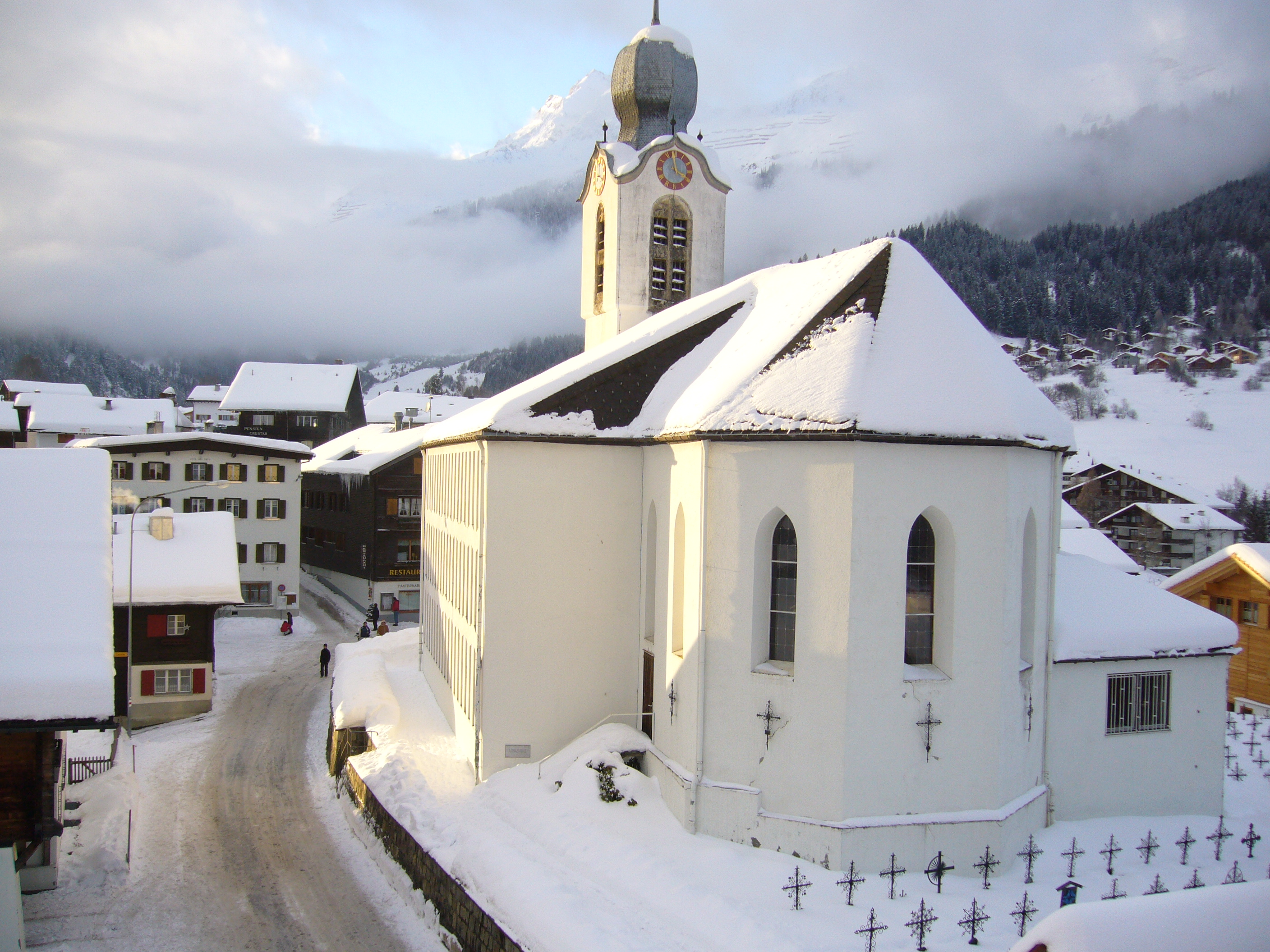 Kirche in Brigels, Kanton Graubünden, Schweiz.